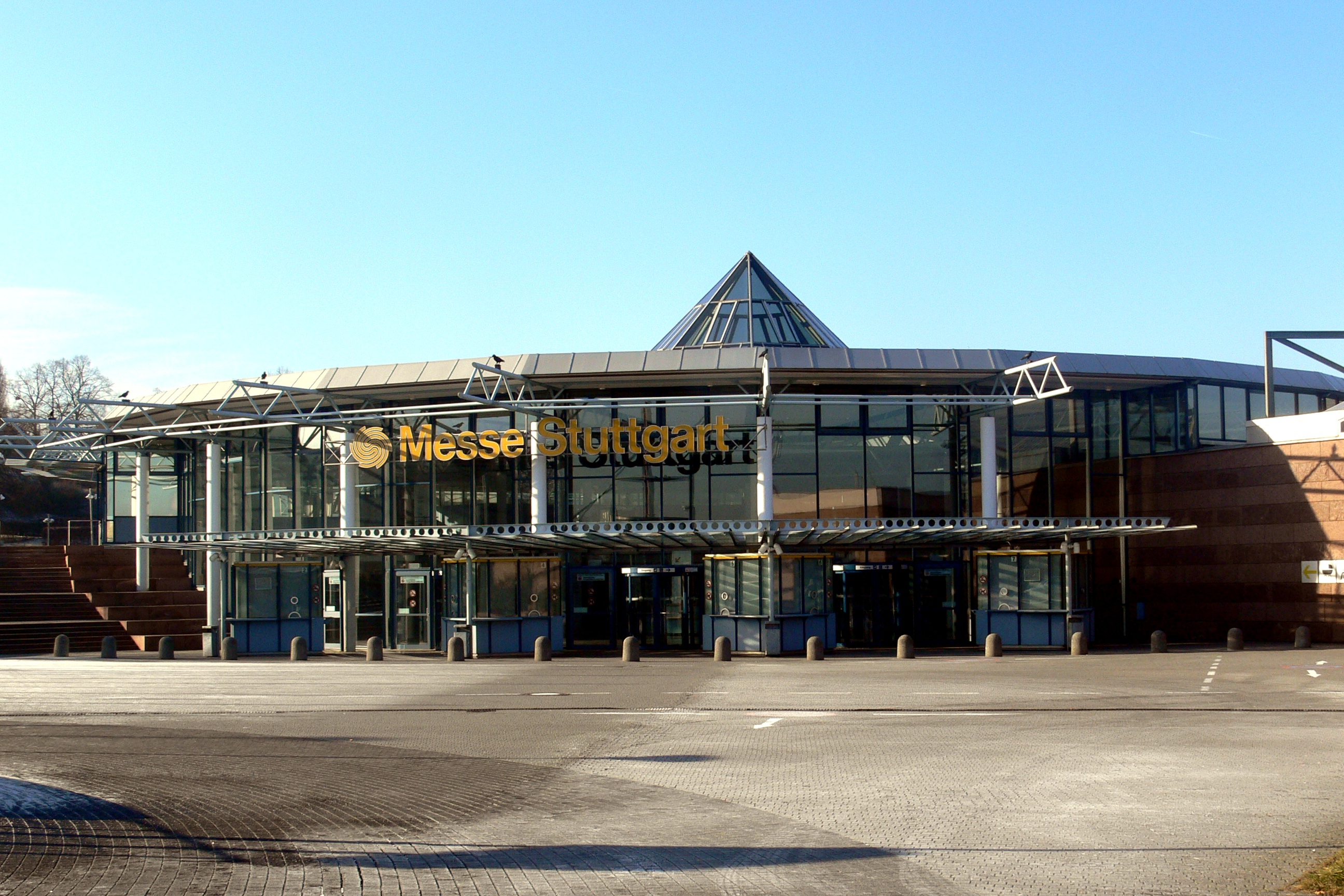 Leerstehende Messegebäude am Killesberg, Stuttgart, fotografiert nach dem Umzug der Messe an das neue Messegelände auf den Fildern 2007